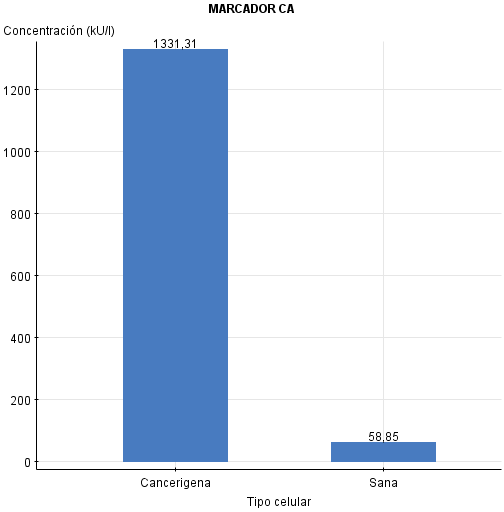 Comparació entre la concentració del marcador tumoral CA en teixits cancerígens i en teixits sans